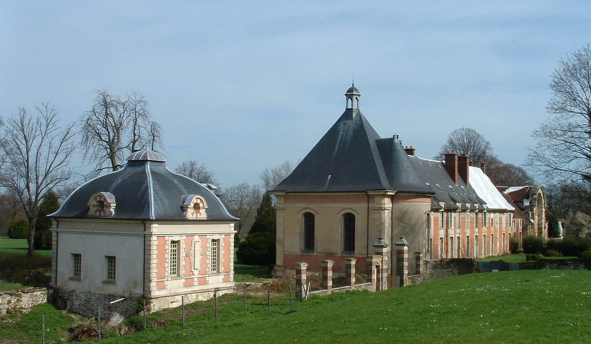 Château de Montceaux - Pavillon d'angle restauré et communs